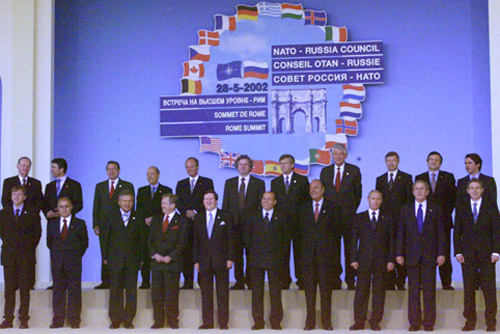 ПРАТИКА-ДИ-МАРЕ (база ВВС Италии). Официальное фотографирование участников саммита Россия–НАТО.